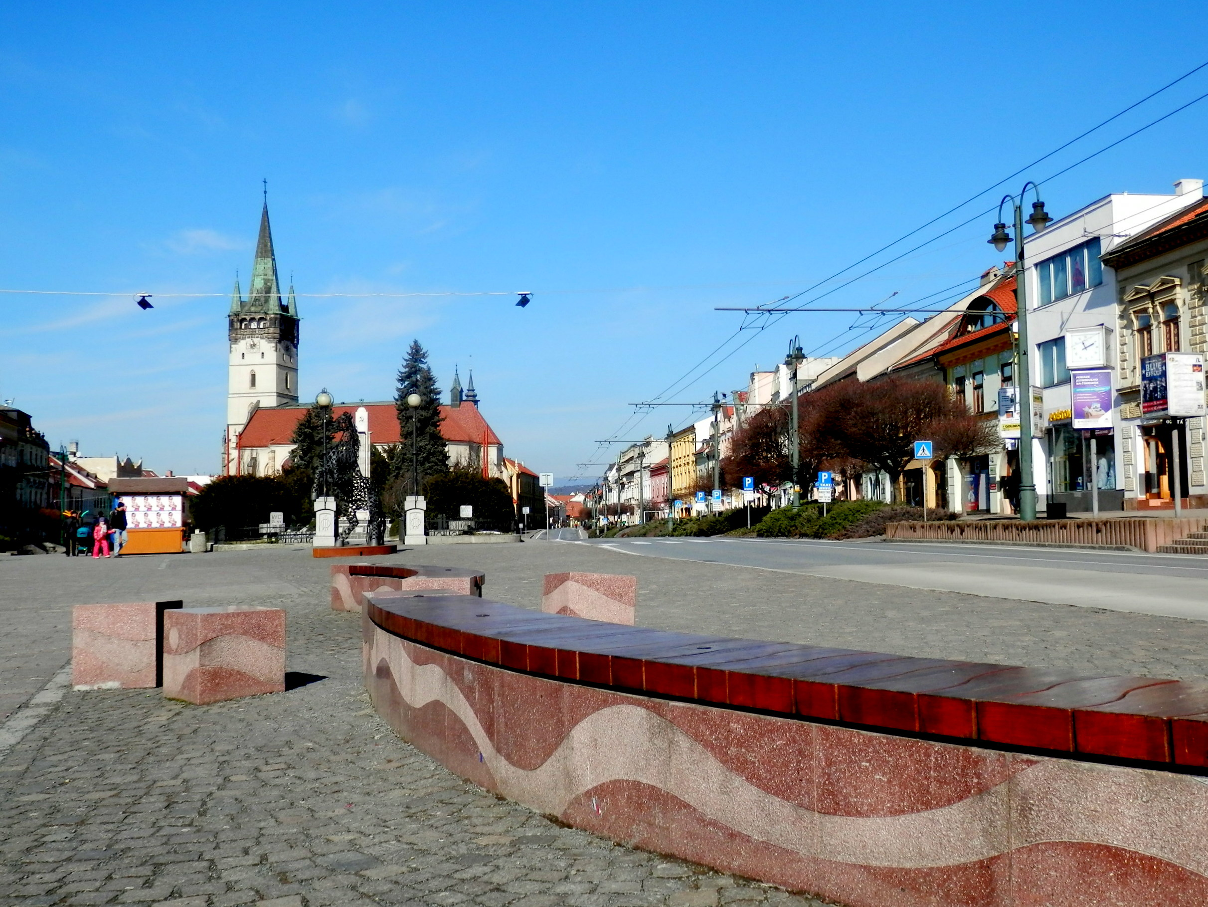 Zástavka BUS. Ulica Hlavná, mesto Prešov.